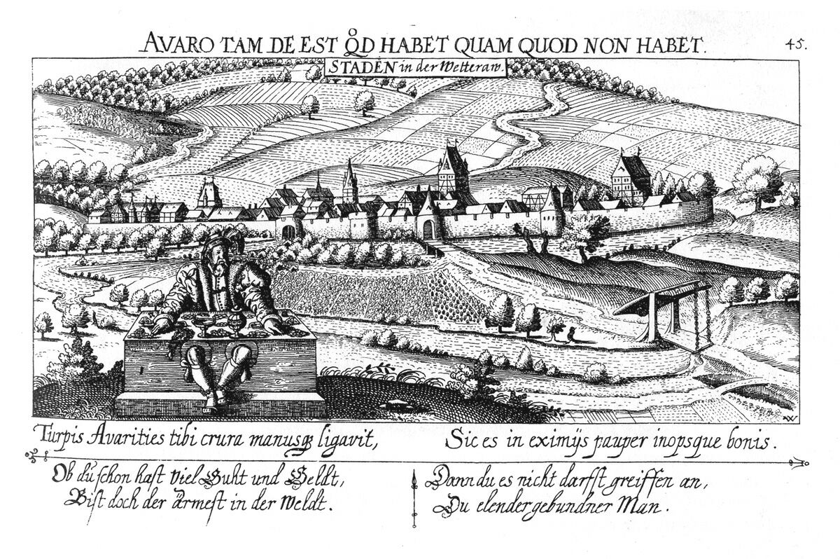 STADEN in der Wetteraw aus Daniel Meisner/ Eberhard Kieser: Thesaurus Philopoliticus oder Politisches Schatzkästlein Bd. 2, Faksimile-Neudruck der Ausgabe Frankfurt/ Main 1625-1626 u. 1627-1631, Nördlingen 1992, Buch 1, Nr. 45.